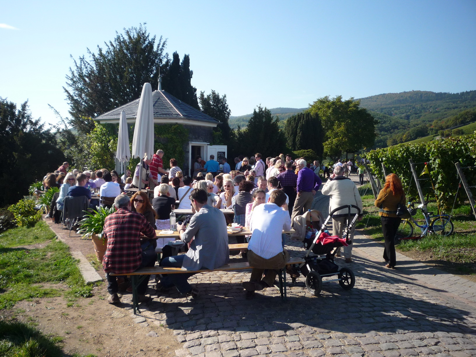 Schlange stehen am Ausschank des Schwarzen Häuschen auf der Domäne Steinberg unterhalb des Kloster Eberbachs. Hier werden die Weine des Staatsgutes Kloster Eberbach verkostet.